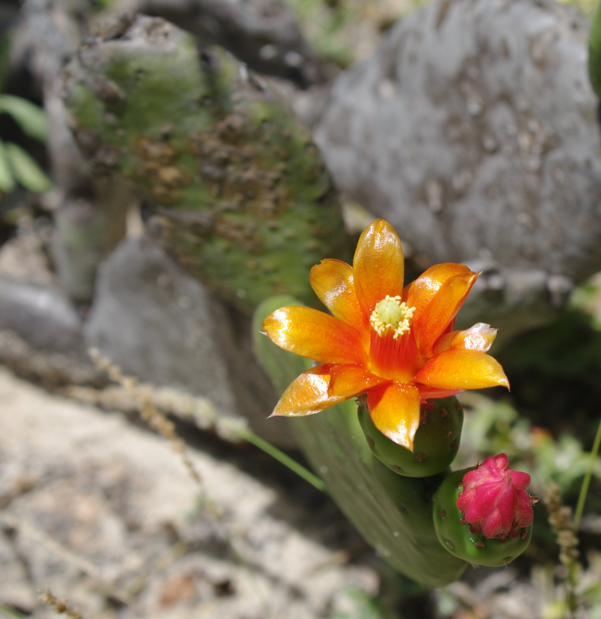 Vale do Catimbau Pernambuco Brasil Mario said: "Opuntia inamoena, Cactaceae"